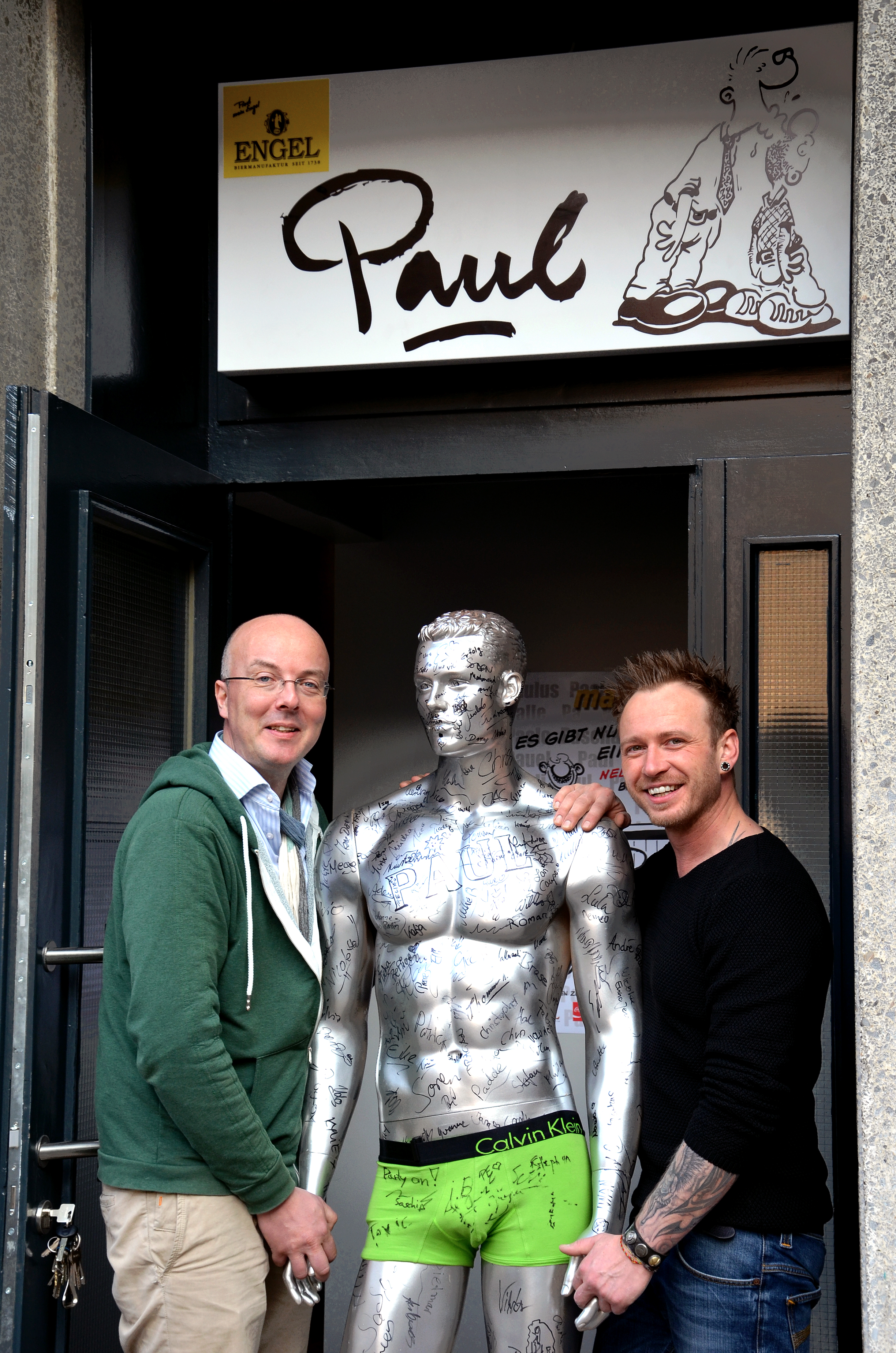 Die Betreiber der Gaststätte Paul in der Bergmannstraße 7 Ecke Escherstraße in Hannover, Dietmar Engel (links) und Christian Kästner mit ihrem von Freunden und Freundinnen vielfach signiertem Eröffnungsgeschenk. Hier stellten sich die drei unter dem sich küssenden Paar von Konrad und Paul des Comic-Zeichners Ralf König nachhaltig der Öffentlichkeit ...